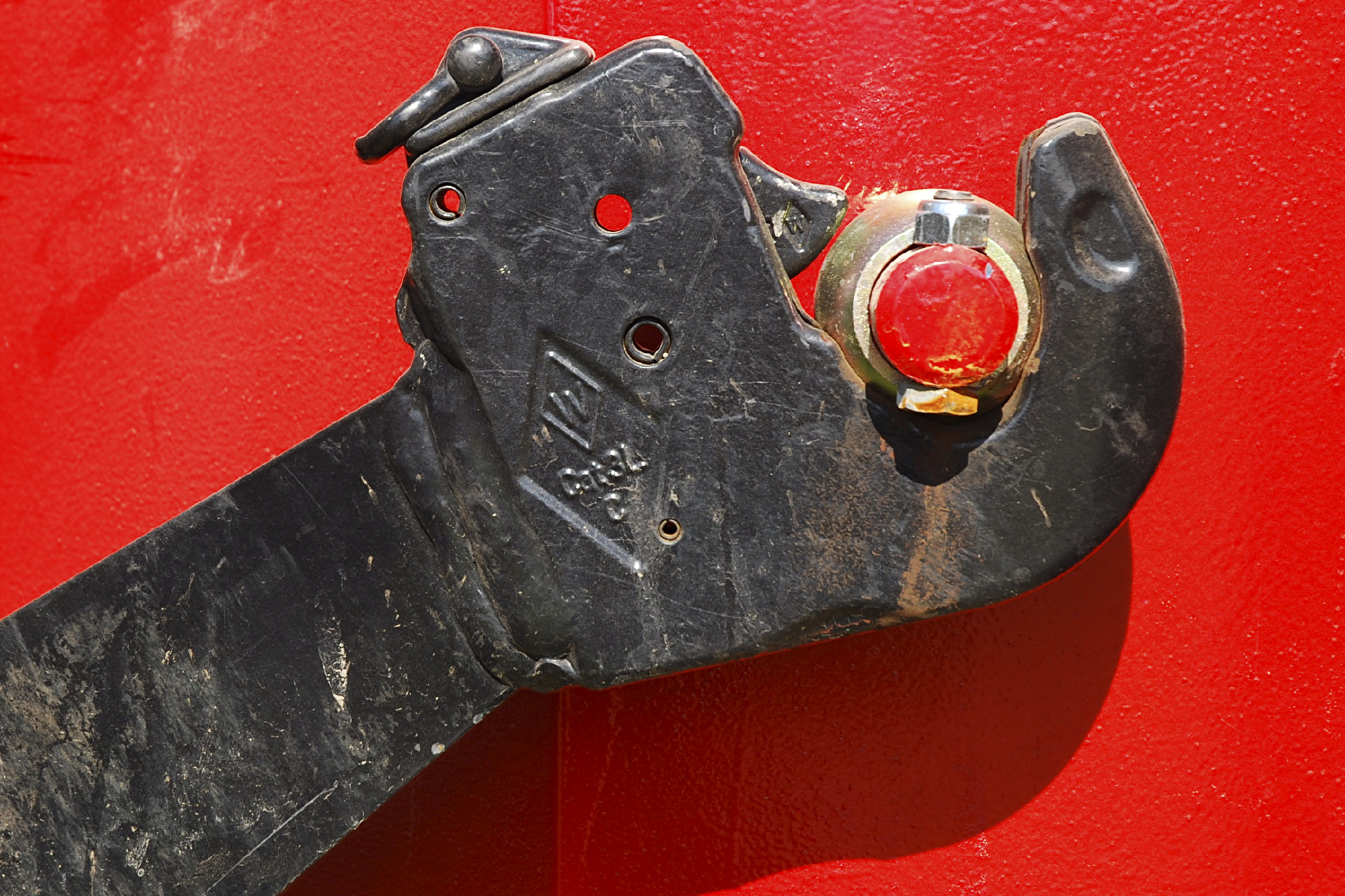 Fanghaken der Kategorie 3 L an einem Unterlenker des Fronthubwerks eines Case-IH-Traktors Puma 225 CVX; das im Hintergrund sichtbare rote Frontgewicht ist mit Hilfe von Fangkugeln angekuppelt.